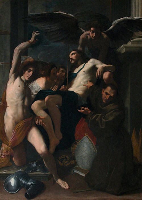 Pietà con los santos Sebastián y Buenaventura, Louvre